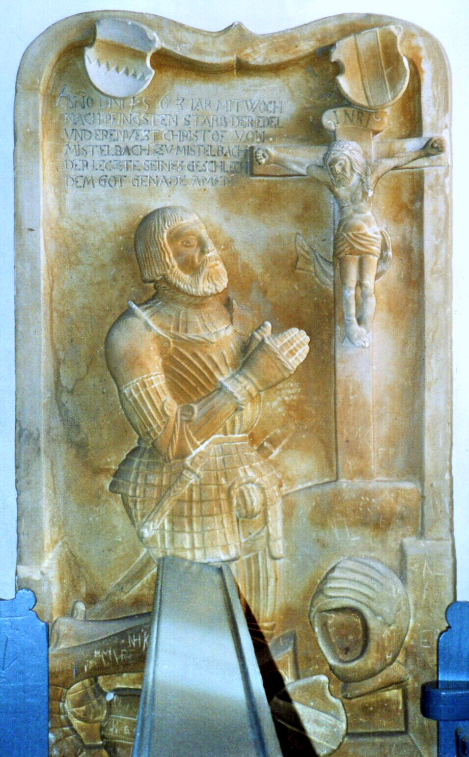 Epitaph des Christoph von Mistelbach, verstorben 1563, letzter seines Geschlechtes